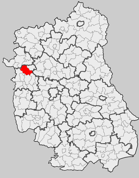 Map of gmina Żyrzyn, Puławy county, Lublin voivodship Mapa gminy Żyrzyn, powiat puławski, województwo lubelskie